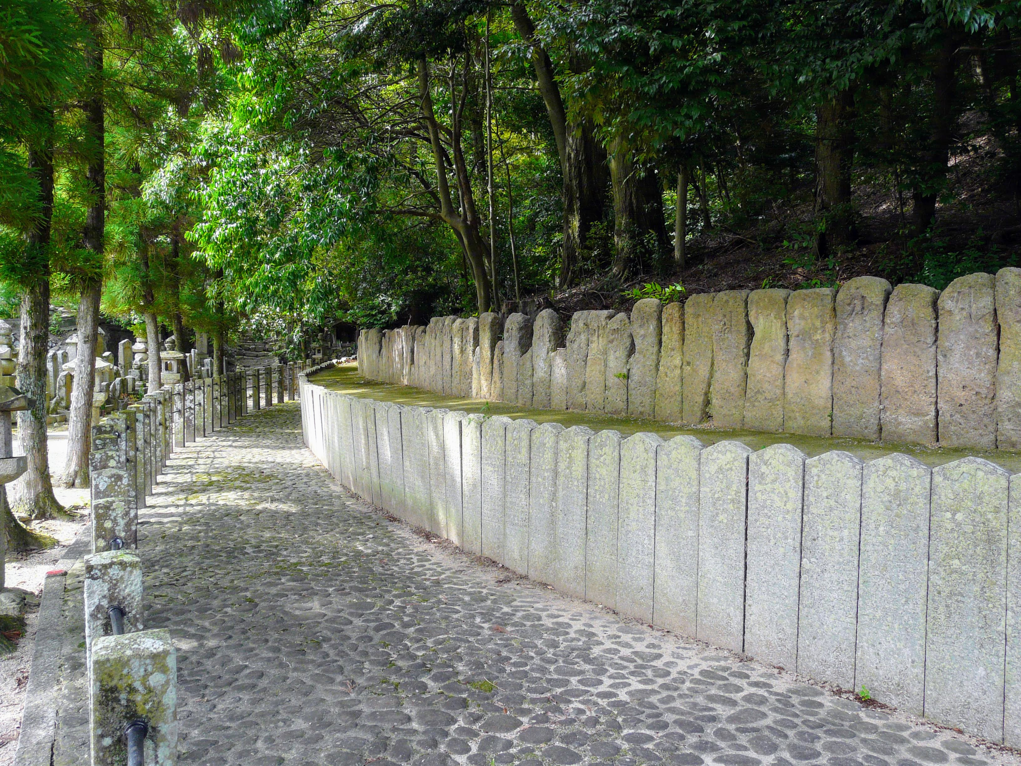 叡福寺境内の聖徳太子、太子の母などが埋葬されるといわれる北古墳墳丘周囲の結界石 Panasonic Lumix DMC-FZ18